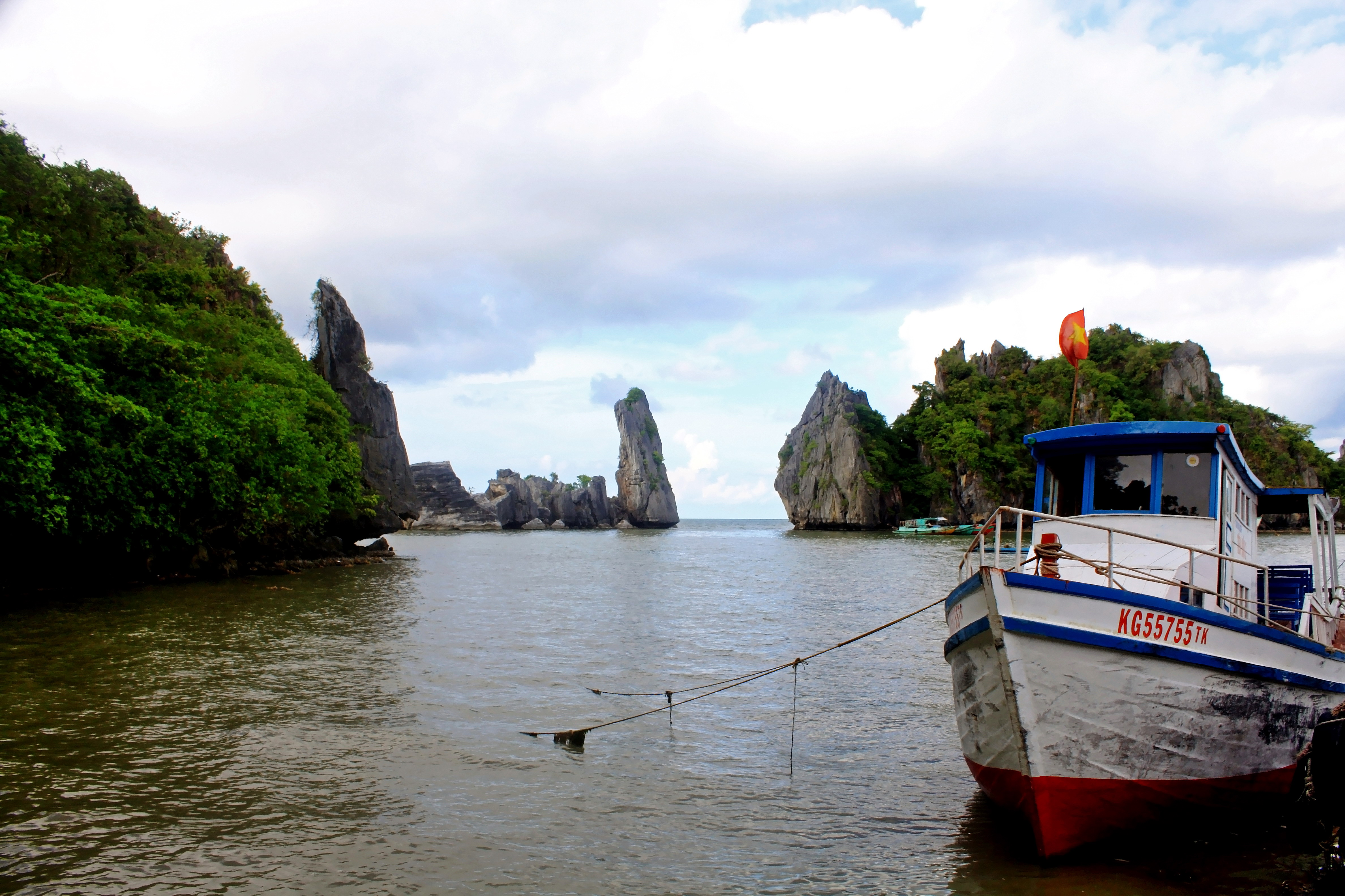 Phong cảnh nơi hòn Phụ Tử ở Kiên Lương, Kiên Giang, Việt Nam